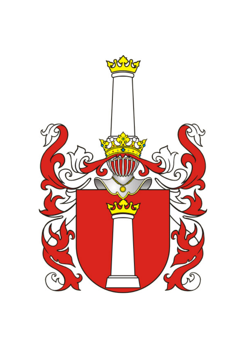 Clan Pierzchala